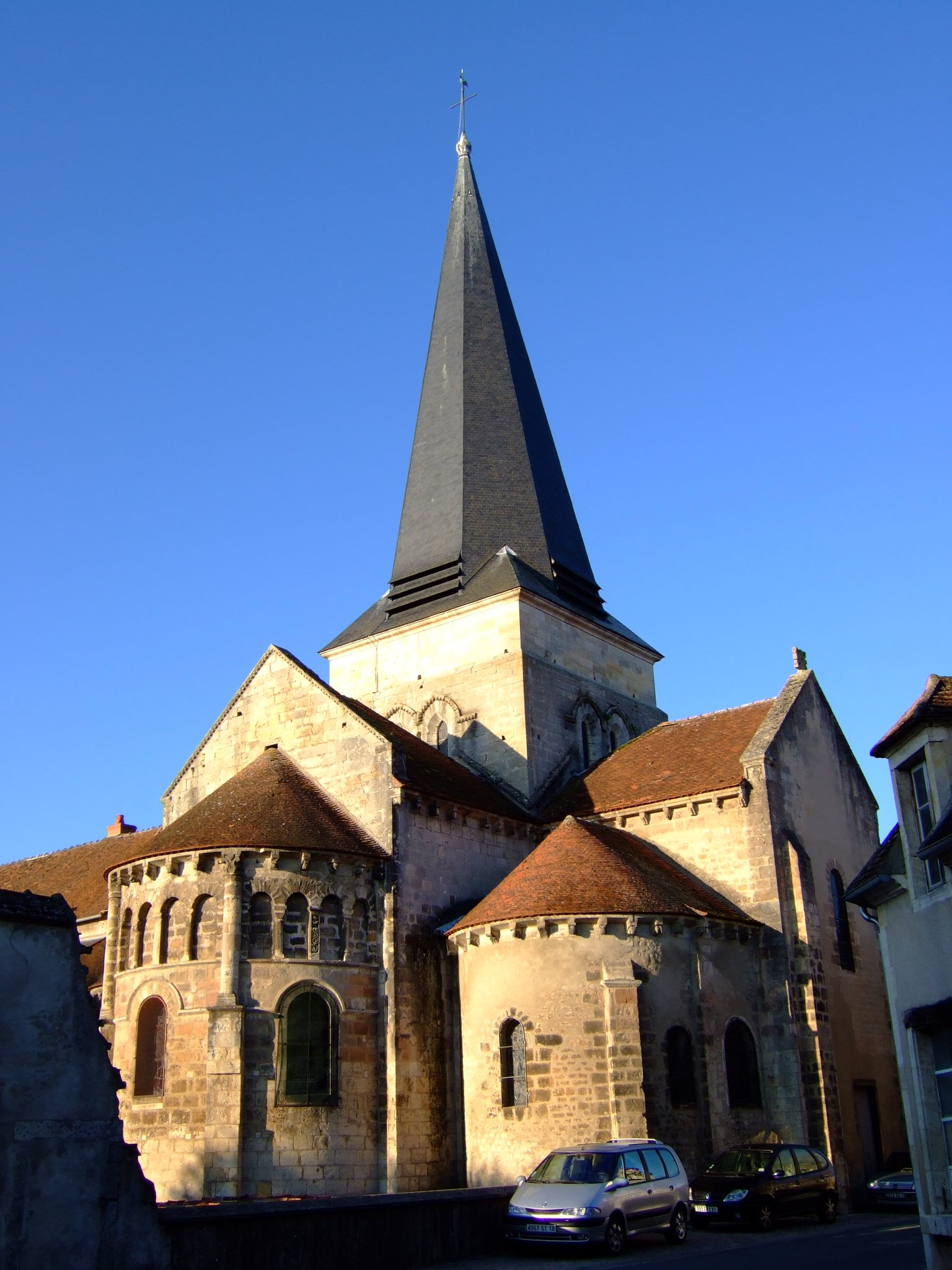 L'église Saint-Amand à Saint-Amand-Montrond - Photo amateur prise par moi-même